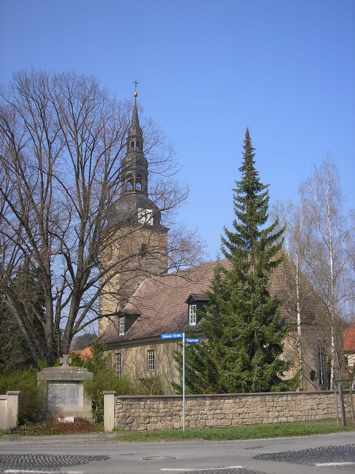 Die Vitikirche in Erfurt-Gispersleben (Thüringen).